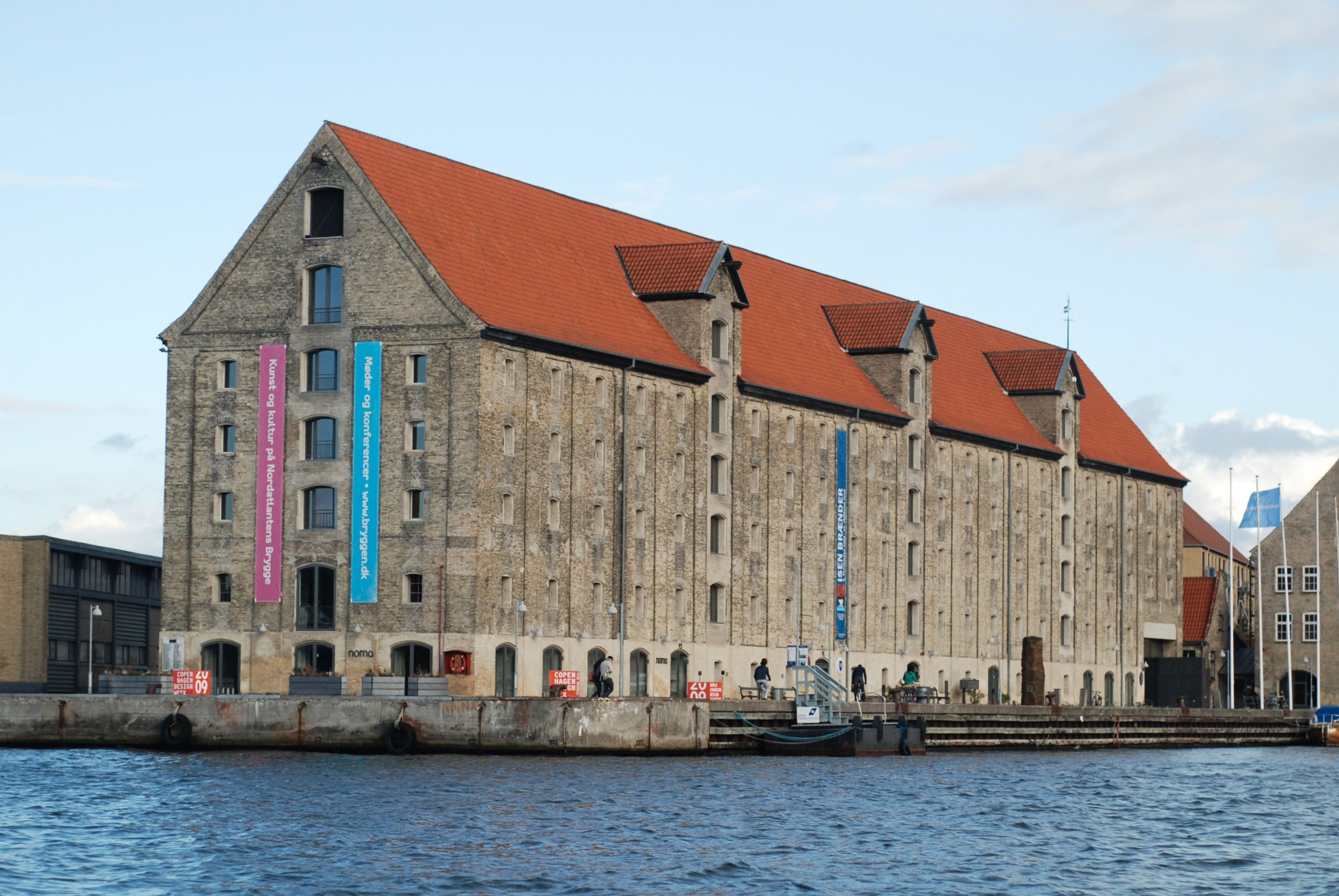 Noma